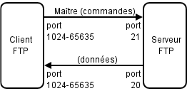 Établissement des connexions par FTP en mode actif